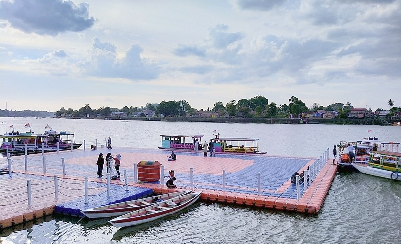 Danau sipin kota jambi